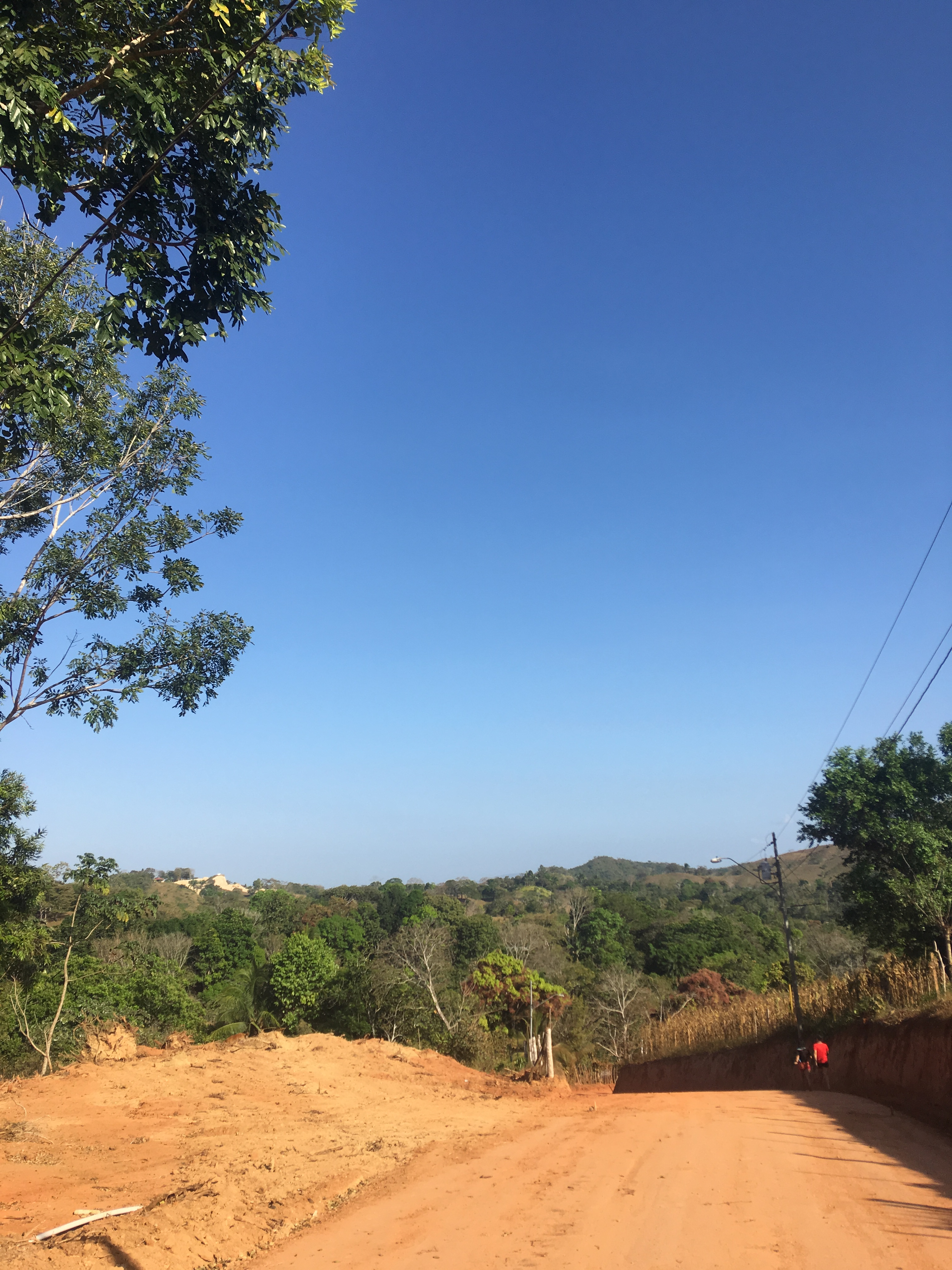 Actualmente, se esta realizando la construccion de la carretera que lleva hacia la parte mas alta de El Chorrillo